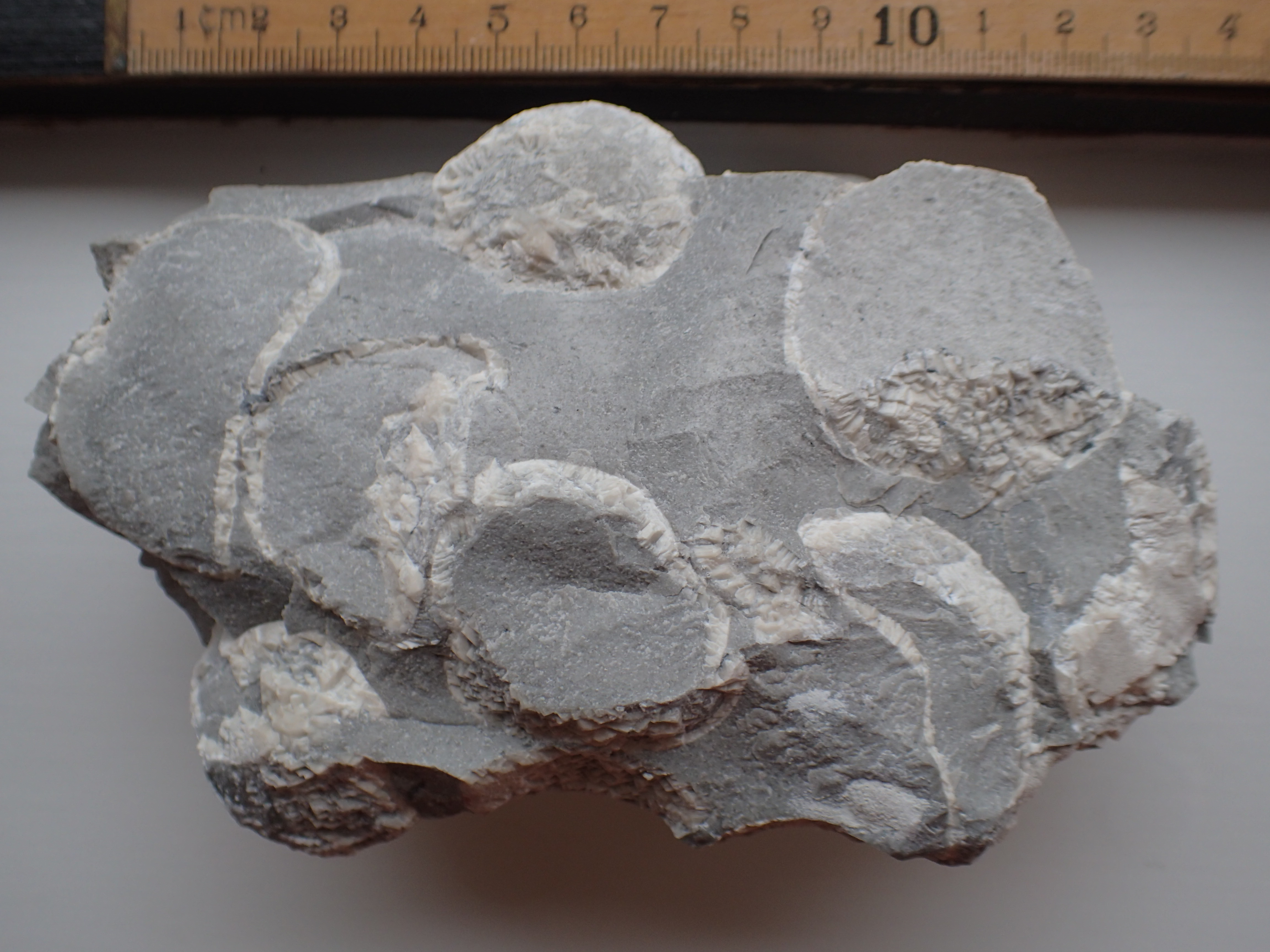 Grå flint med fossiler af søpindsvin, Krauseparken i København